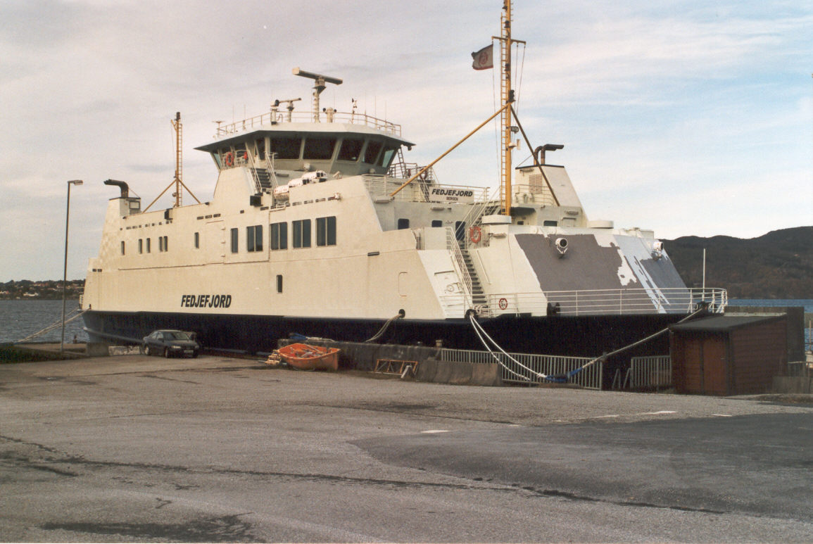 MF Fedjefjord, built 2001.